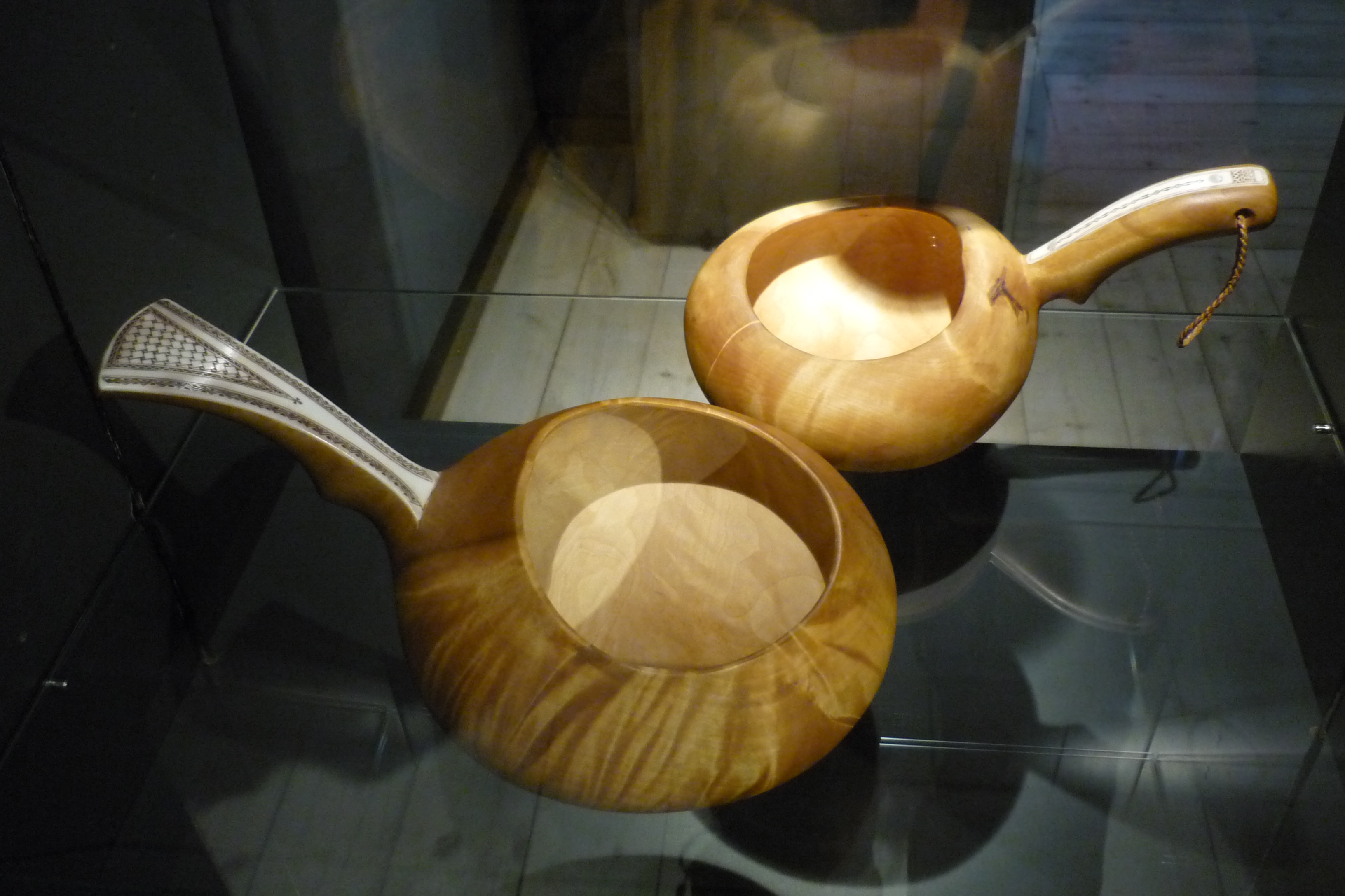 Sami Milking bowls (Guksi)